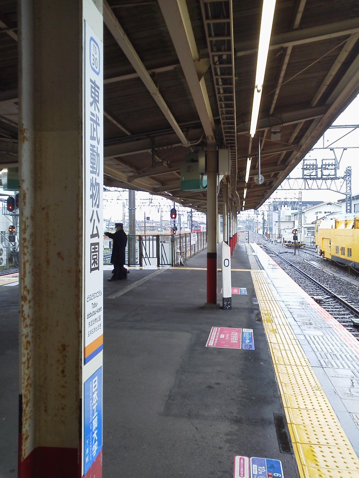 Tobuzoo 0km